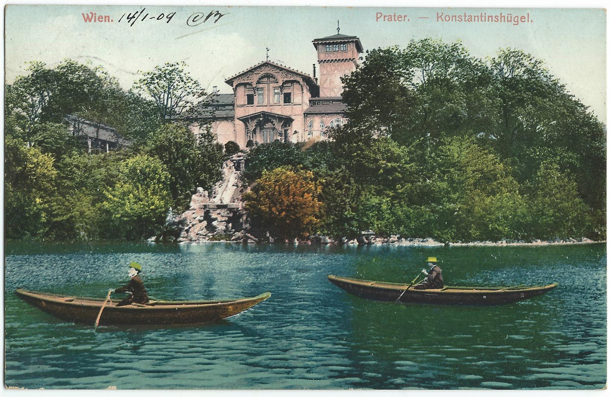 Vue de Vienne au début du XXe siècle.